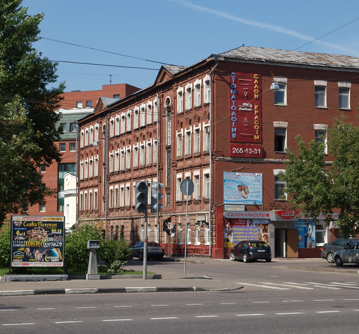 Balakirevsky Lane, Moscow